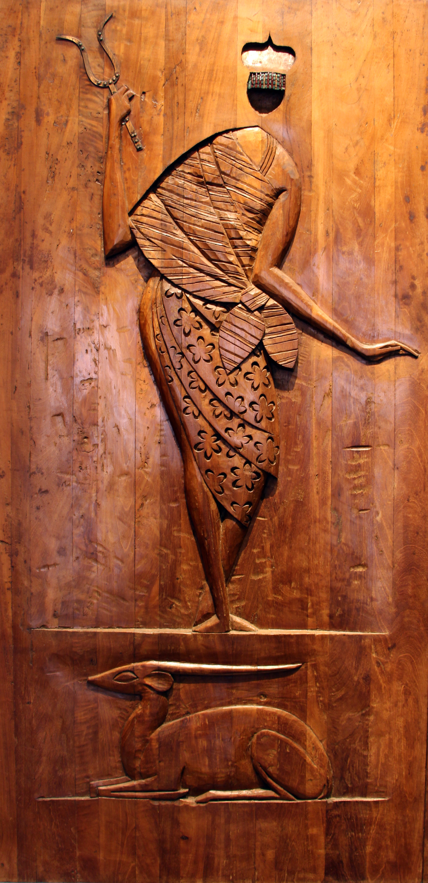 Candomblé nel Museu Afro-Brasileiro, Salvador